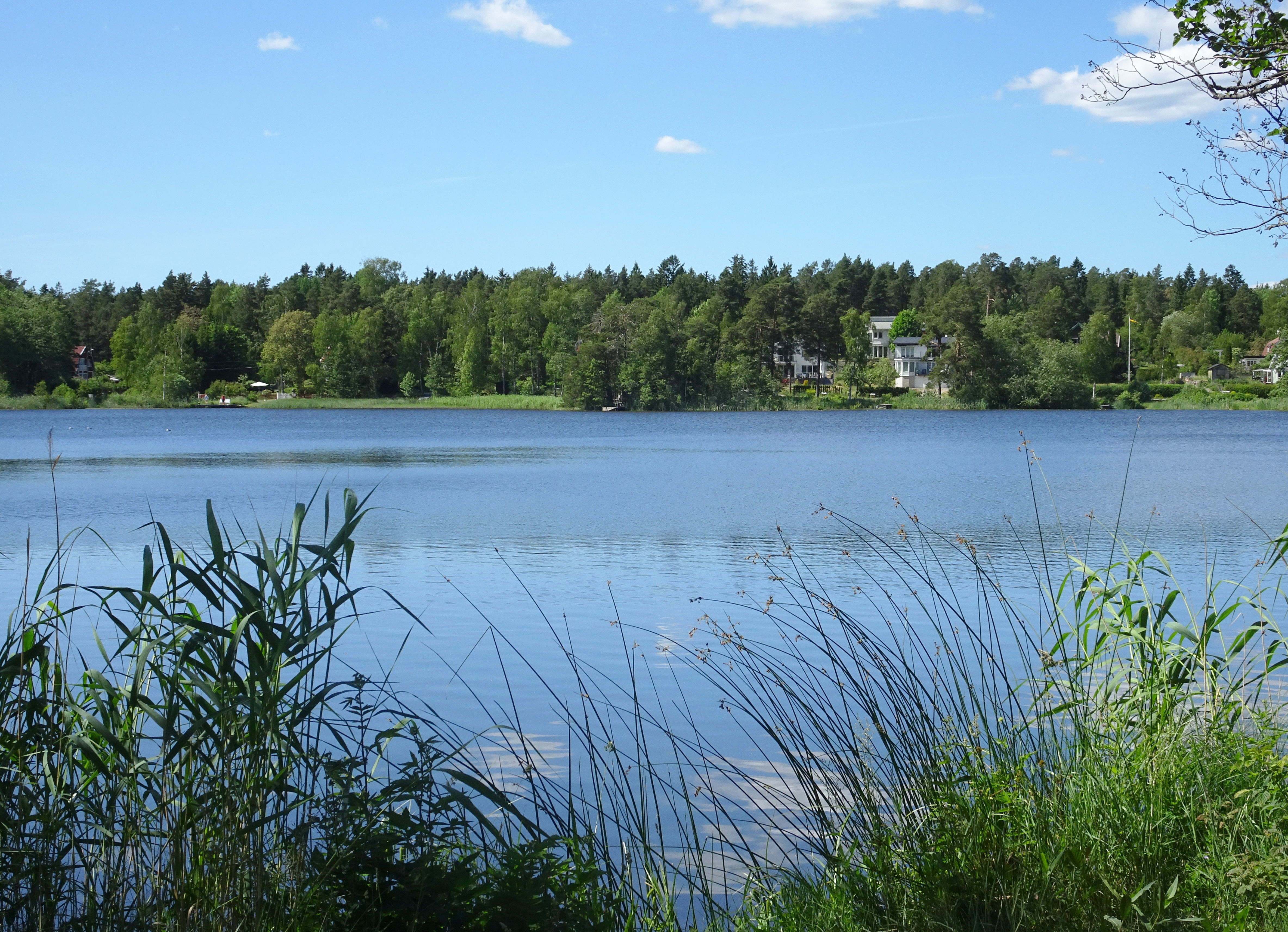 Myrsjön, Orminge, Nacka kommun